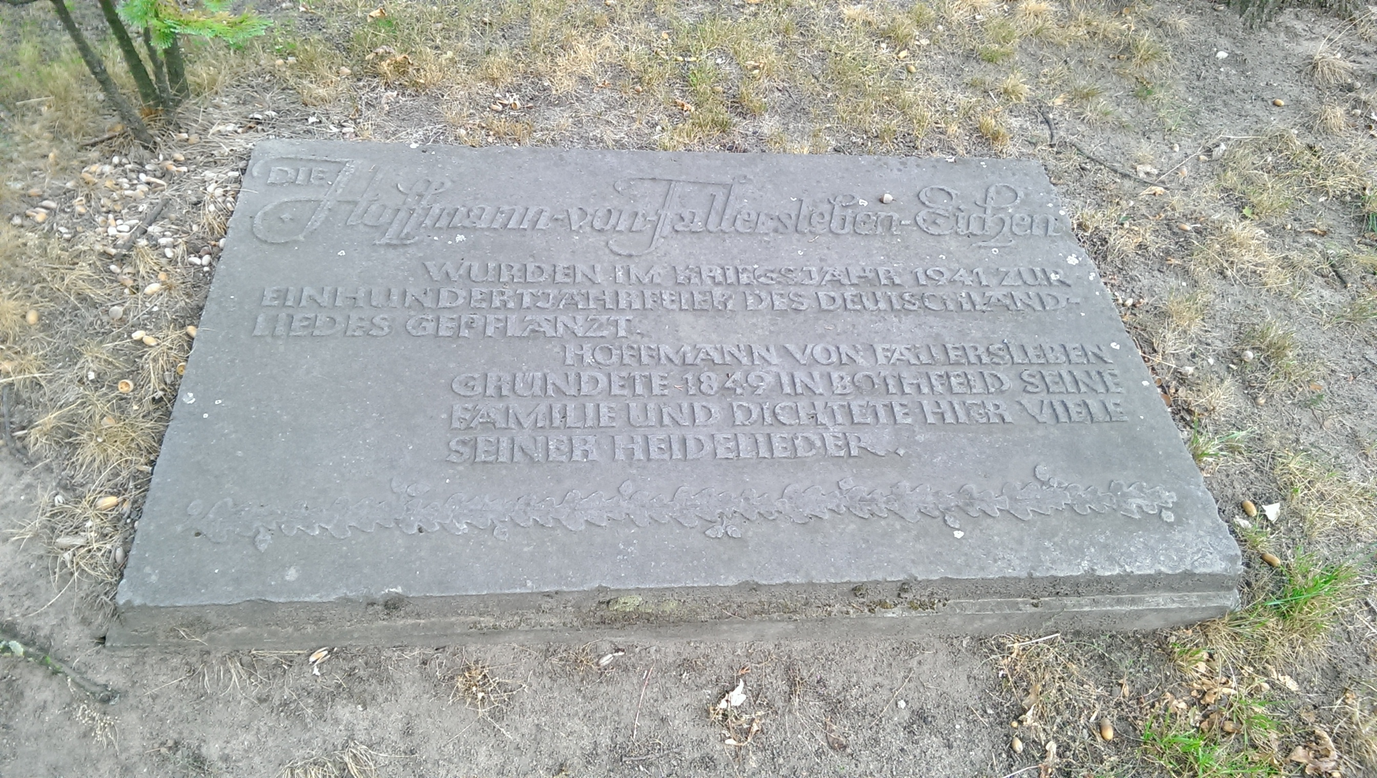 Gedenktafel Hoffman von Fallersleben an der Südseite von St. Nicolai